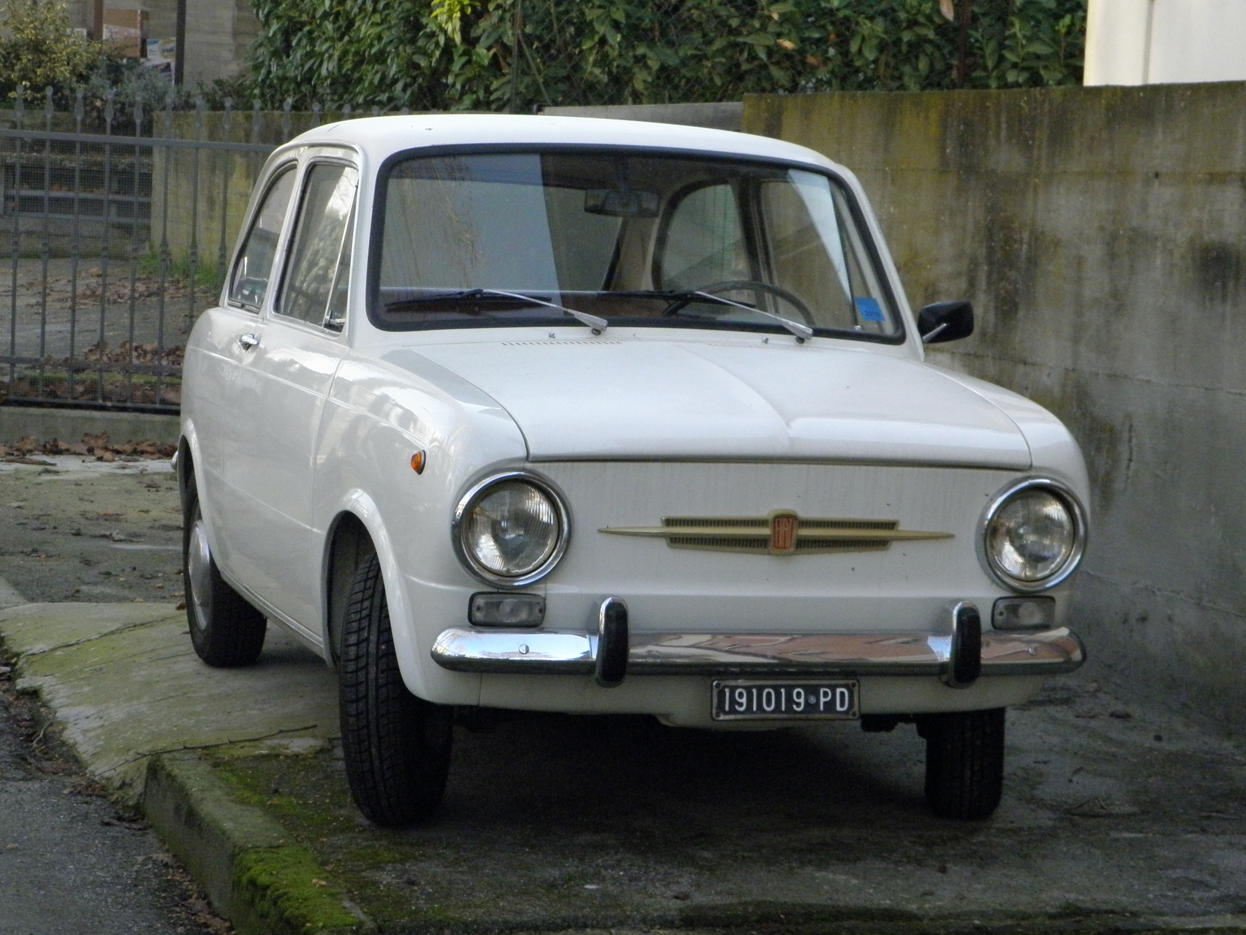 Fiat 850 fotografata in Via Fuà Fusinato, Rovigo.